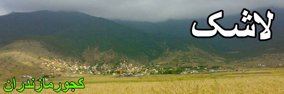 لاشك (كجورمازندران)